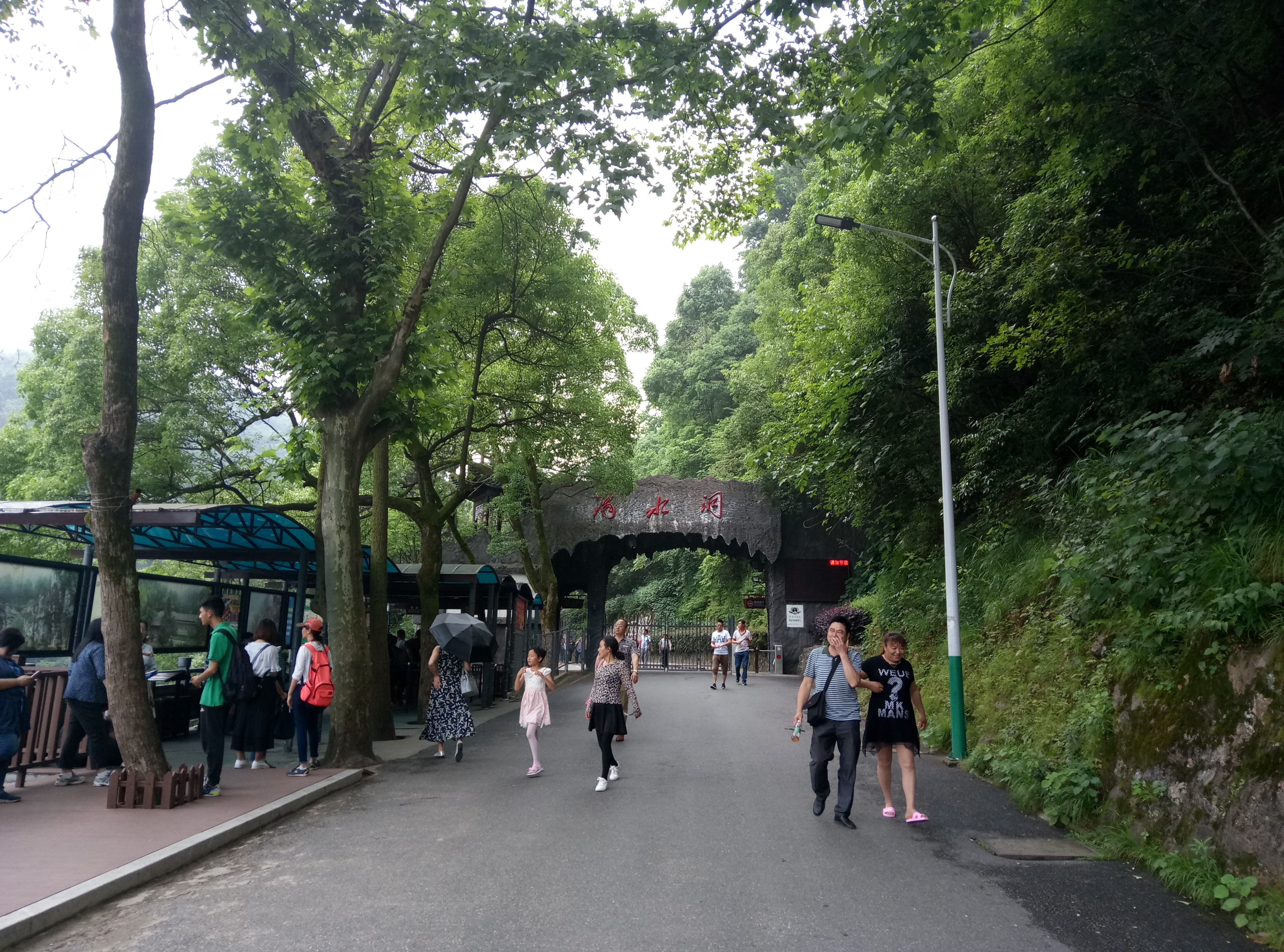 滴水洞大門